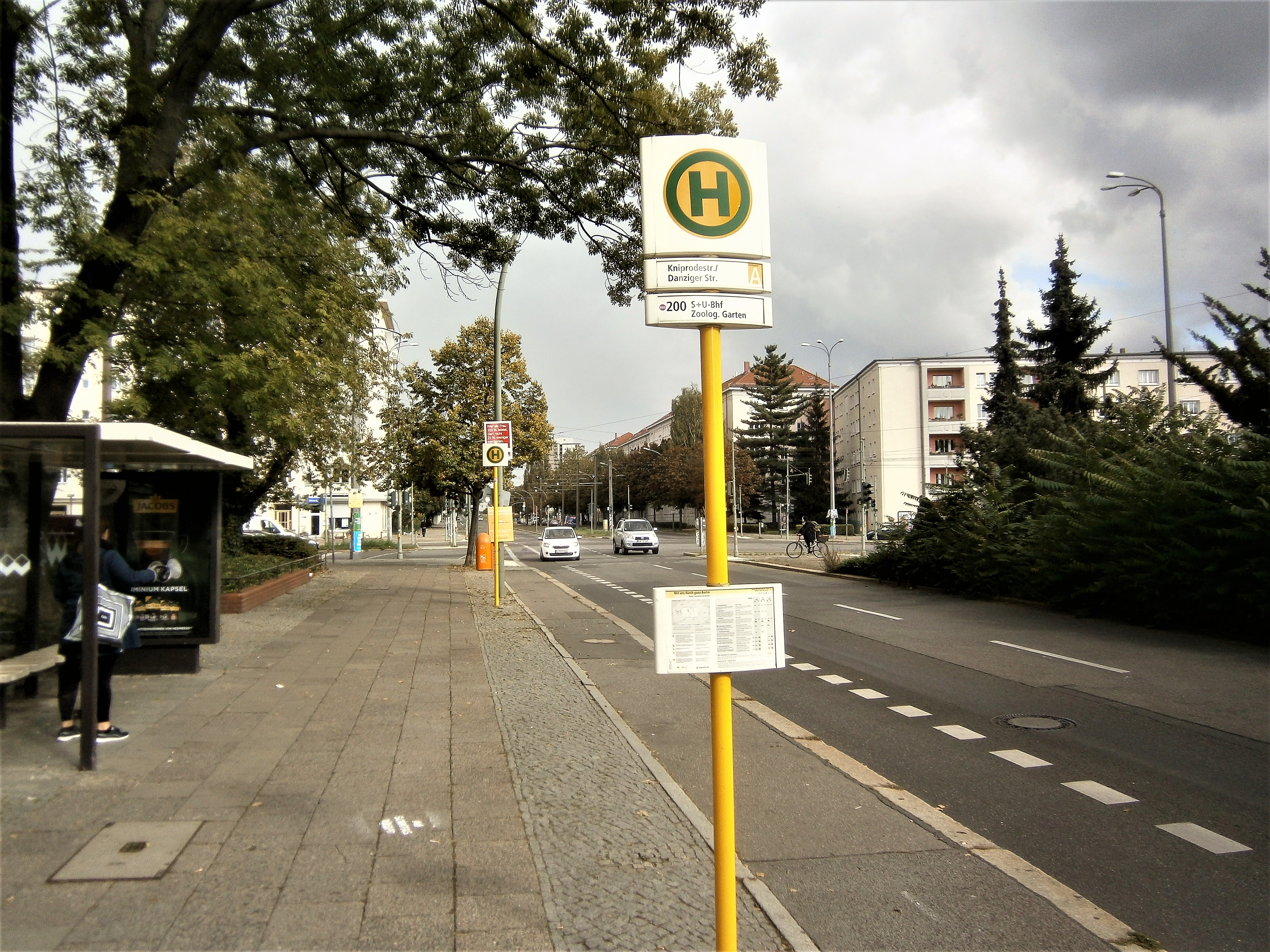 Die Kniprodestraße ist ein Verkehrszug im Berliner Bezirk Pankow, Ortsteil Prenzlauer Berg mit Grundstückszählung in Hufeisen. Bild: Bushaltestelle südwestlich der Kreuzung Danzoger Straße.